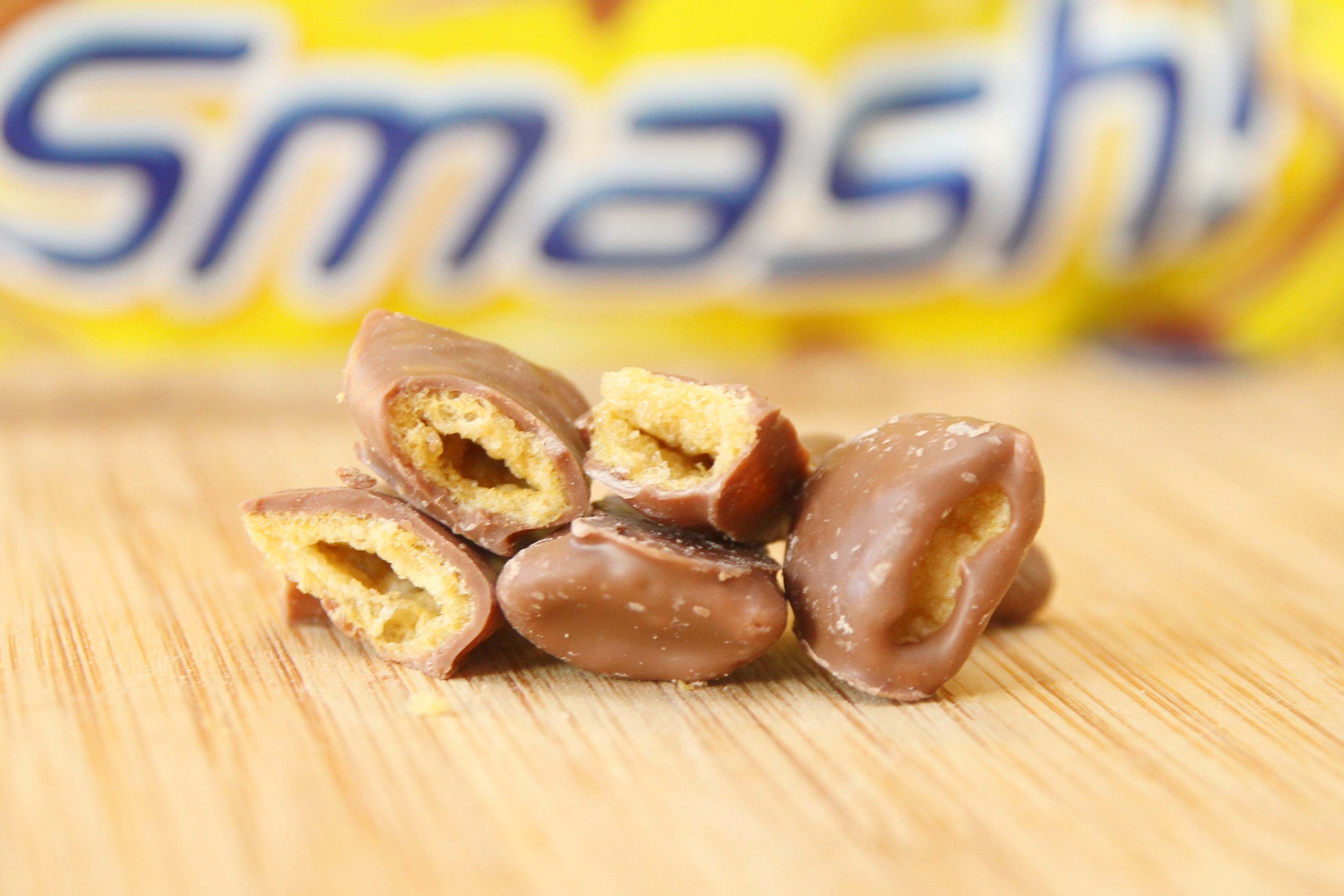 Sjokoladen Smash.